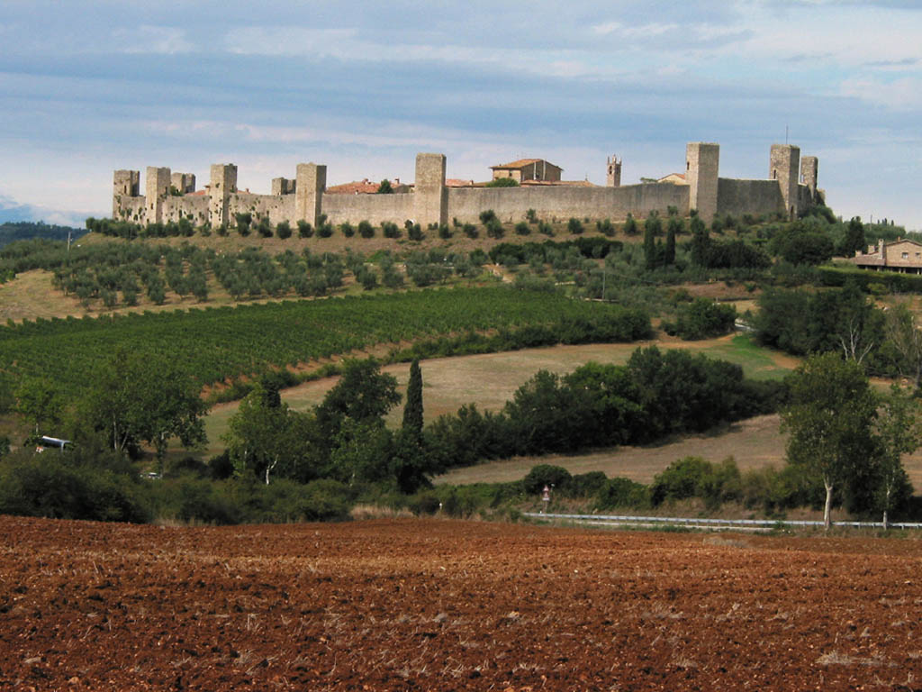 Monteriggioni